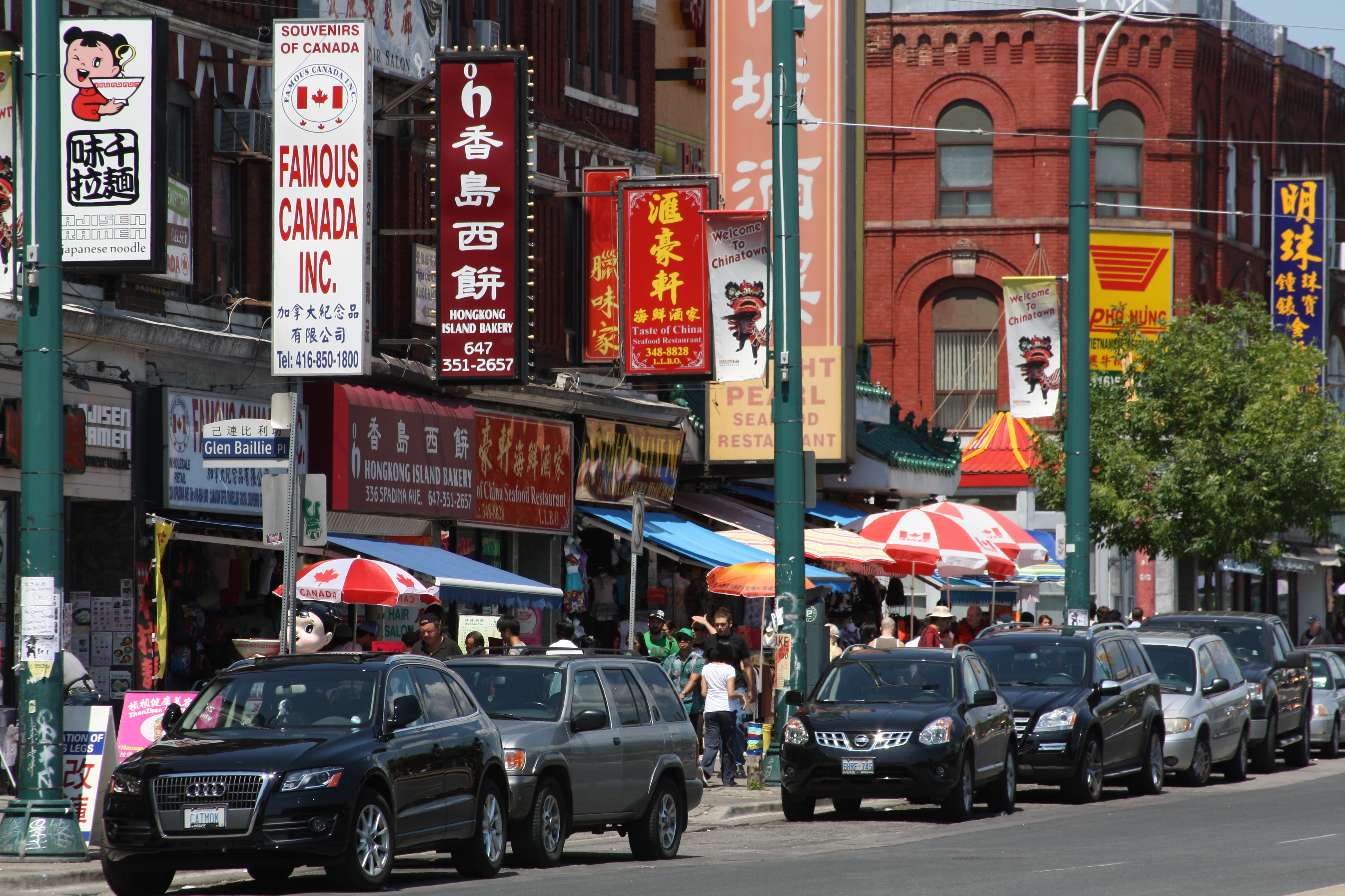 Spadina Ave.